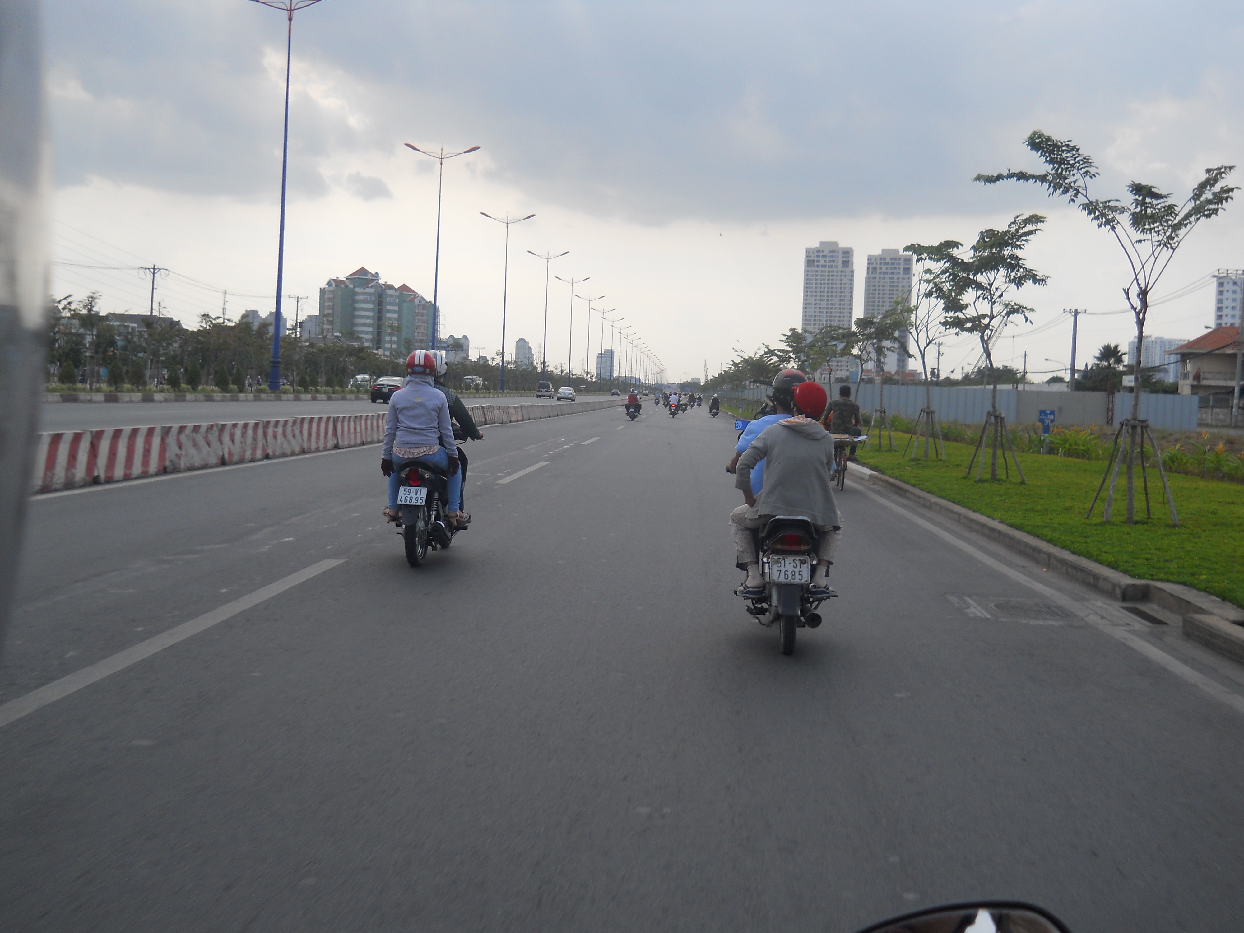 Xa lộ Hà Nội, đoạn qua quận 2, Thành phố Hồ Chí Minh